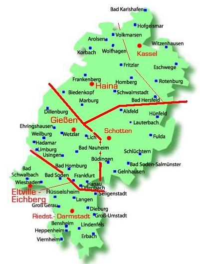 Ambulanzregion der FpAH aufgeteilt nach Landgerichtsbezirken